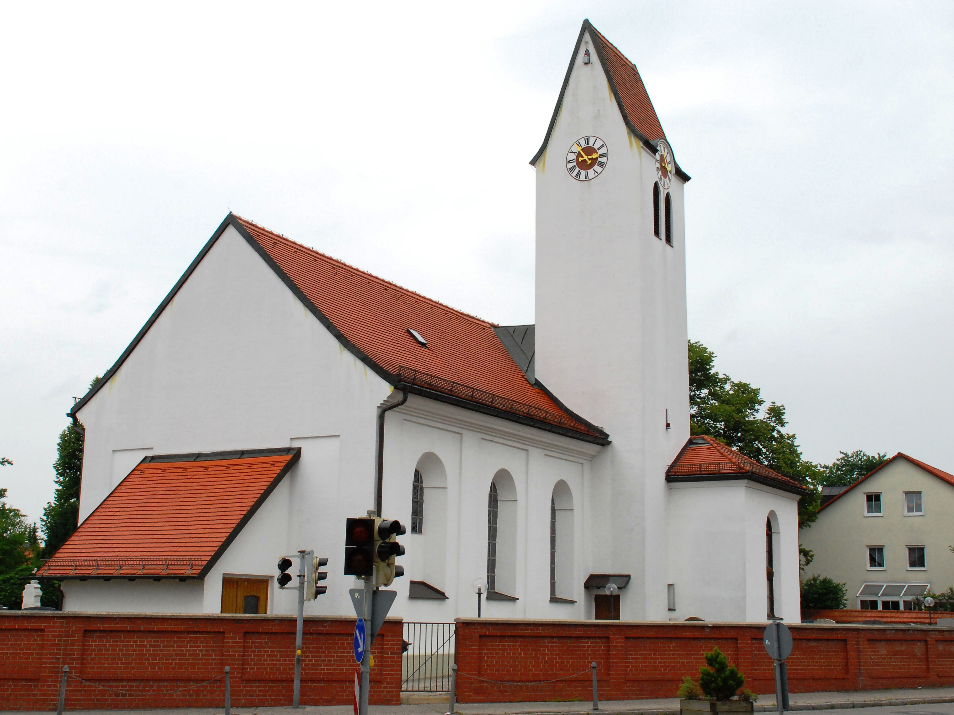 Katholische ehemalige Pfarrkirche St. Stephan in der Glonner Straße in Putzbrunn, Landkreis München, Regierungsbezirk Oberbayern, Bayern. Als Baudenkmal in der Bayerischen Denkmalliste unter Aktennummer D-1-84-140-1 aufgeführt. Laut Denkmalliste in den Jahren 1723 bis 1725 erbaut.